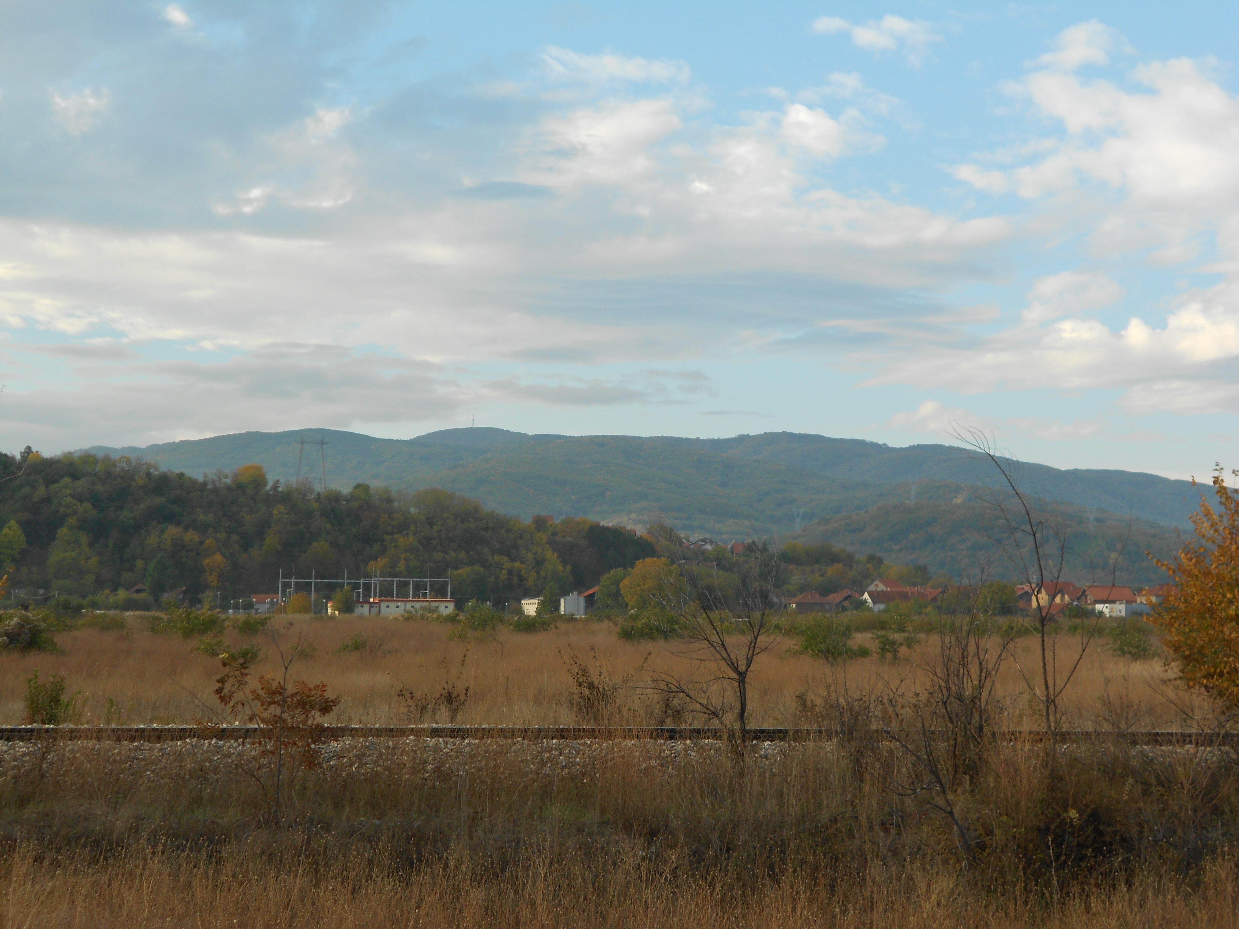 Драган Цветковћ Ниш сопствена слика 2013. поглед на Селичевицу из Нишке котлине са пута Ниш-Нишка Бања